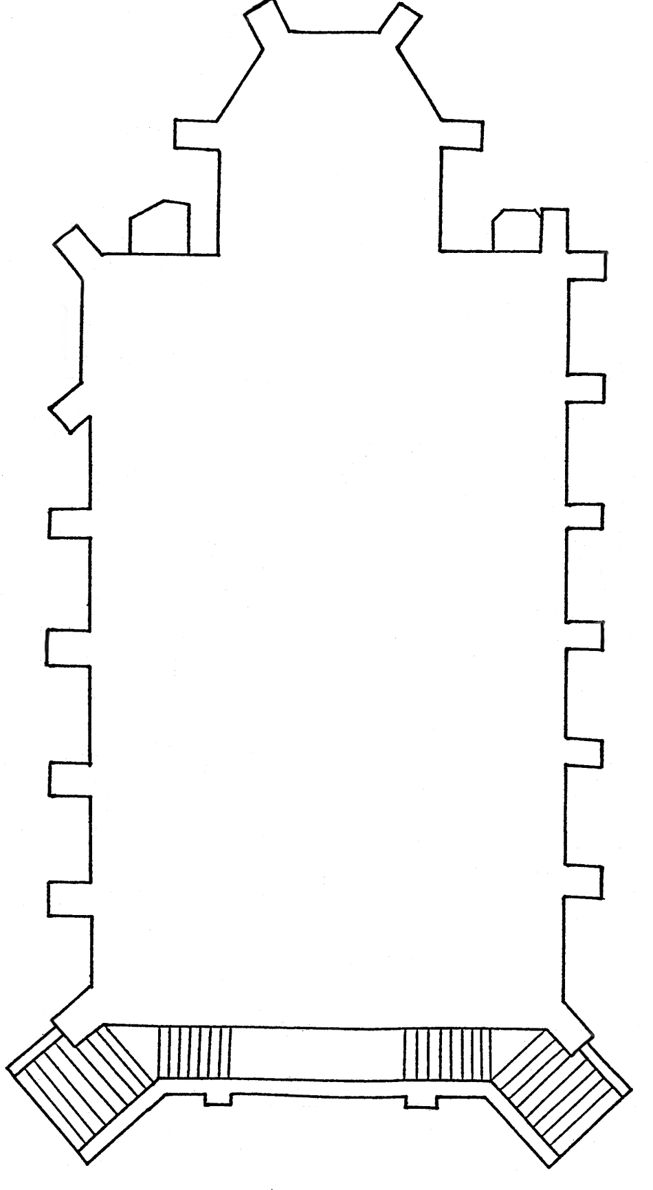 Půdorys kostela sv. Alžběty